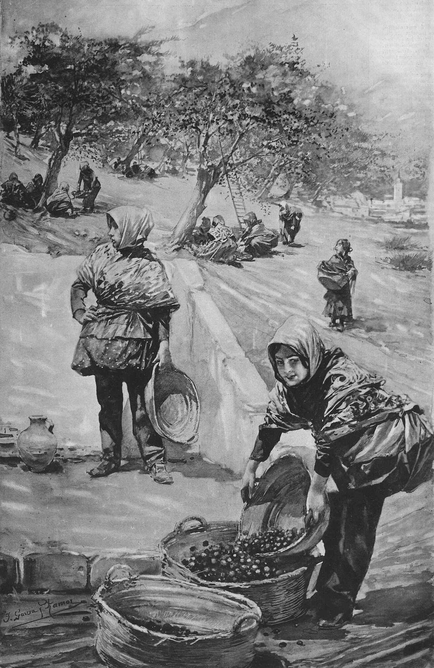 Sevilla. Las cogedoras de aceitunas. Dibujo original de J. García Ramos.